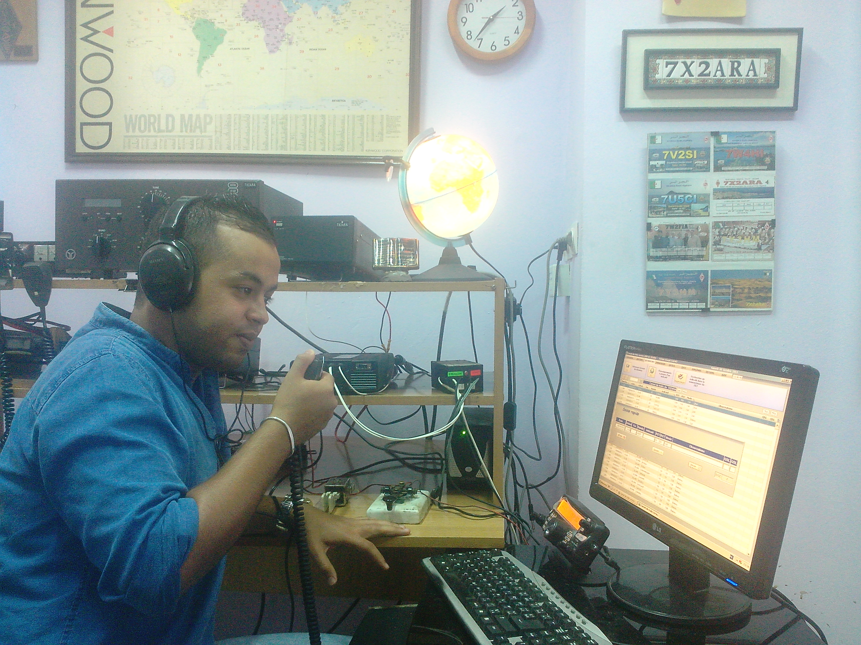 هاوي اتصالات أثناء اجراءه لاتصال